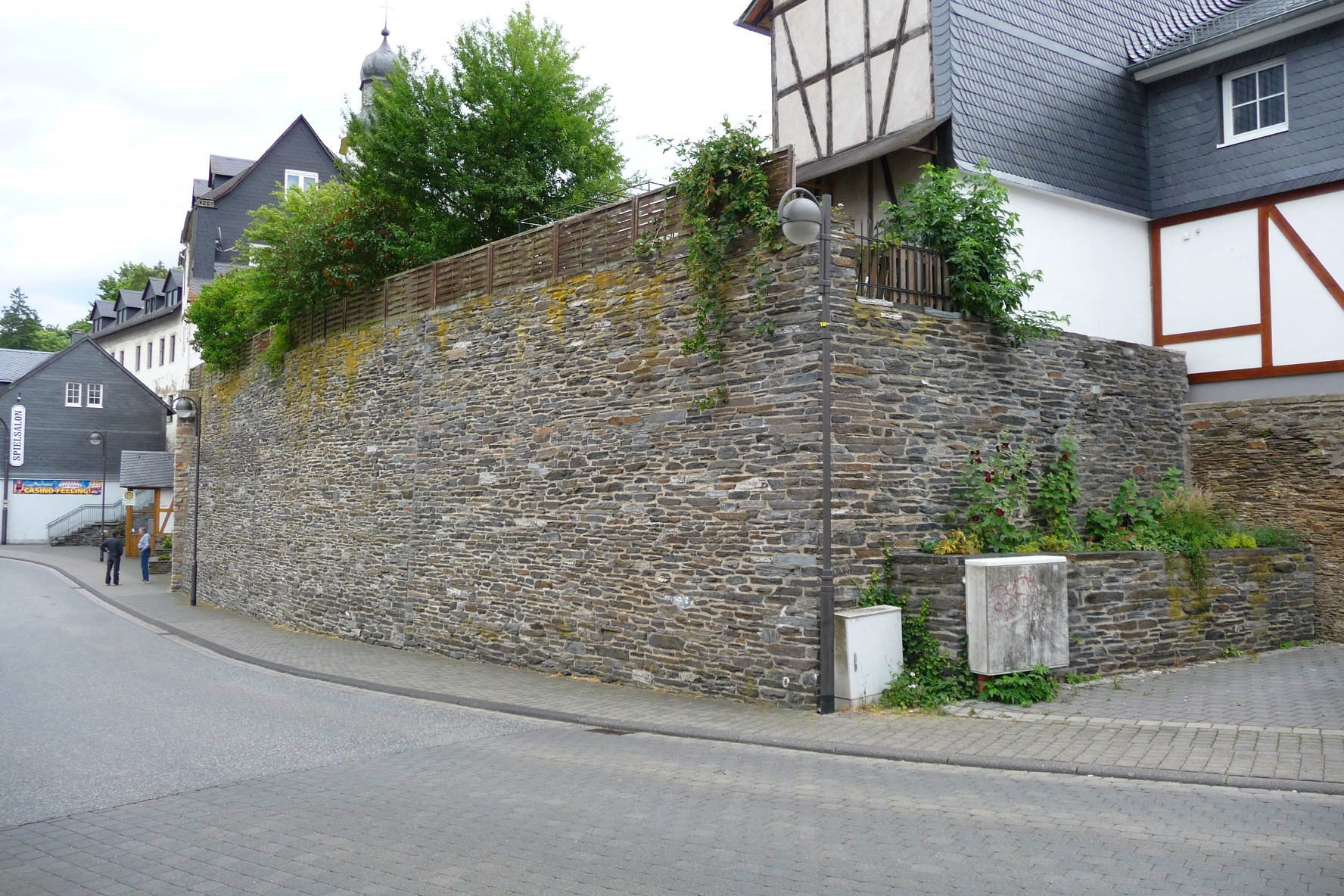 Reste der mittelalterlichen Stadtmauer von Simmern/Hunsrück an der Koblenzer Straße